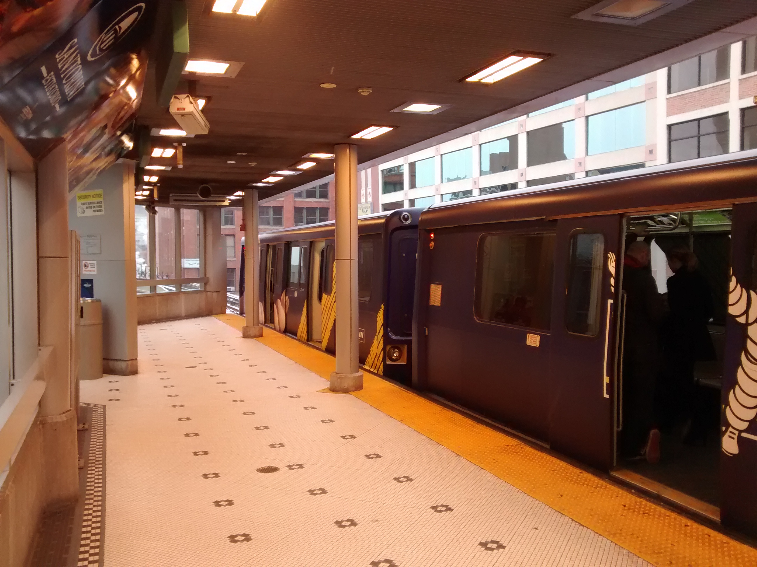 Greektown (Detroit People Mover)